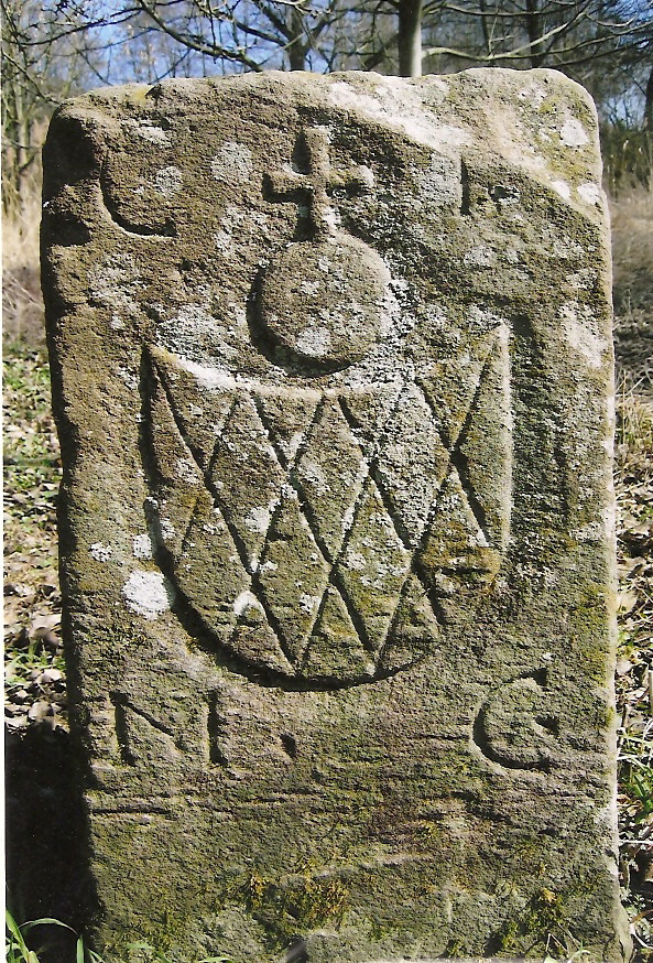 Grenzstein in Eschelbronn neben der Bahnlinie nach Neidenstein von 1780. Inschriften: CP (Kurpfalz) und MC (Meckesheimer Cent). Auf der Vorderseite kann man den Reichsapfel und die Rauten des MC erkennen. Auf der Rückseite befindet sich das Wappen der Familie von Vennigen.